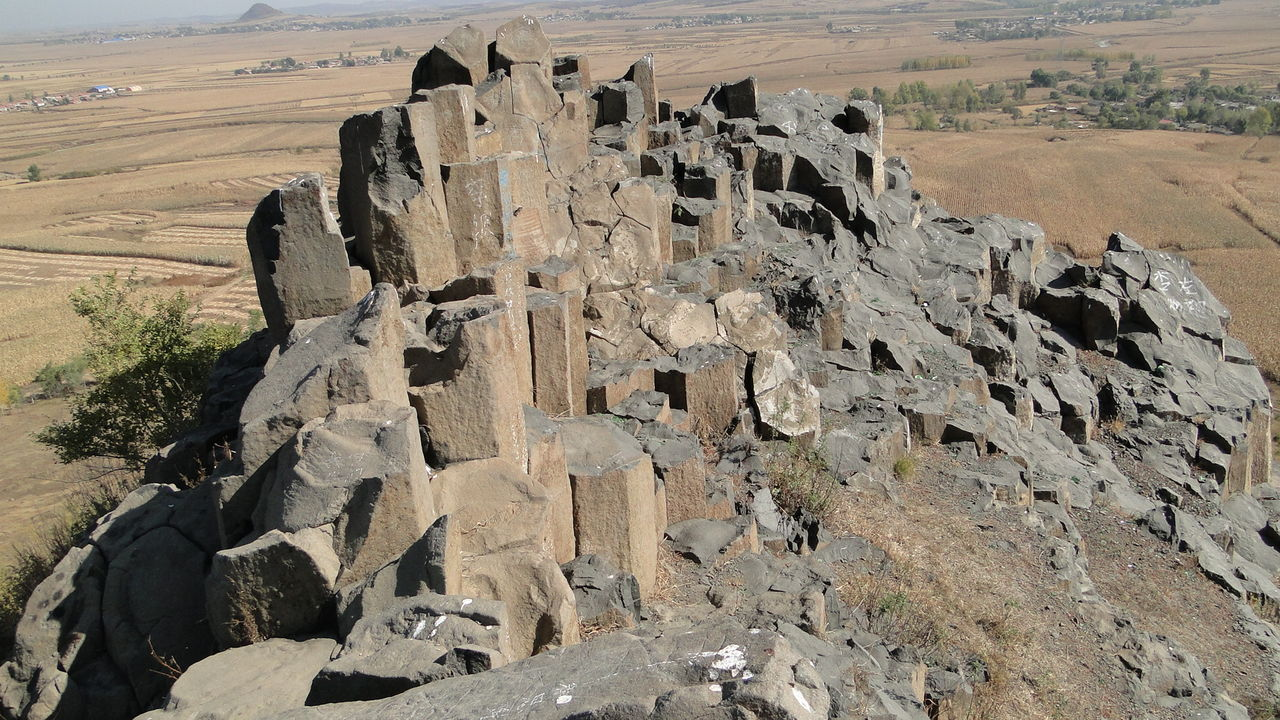 中国吉林省伊通满族自治县西尖山（伊通火山群的一部分）上的玄武岩柱状结构。